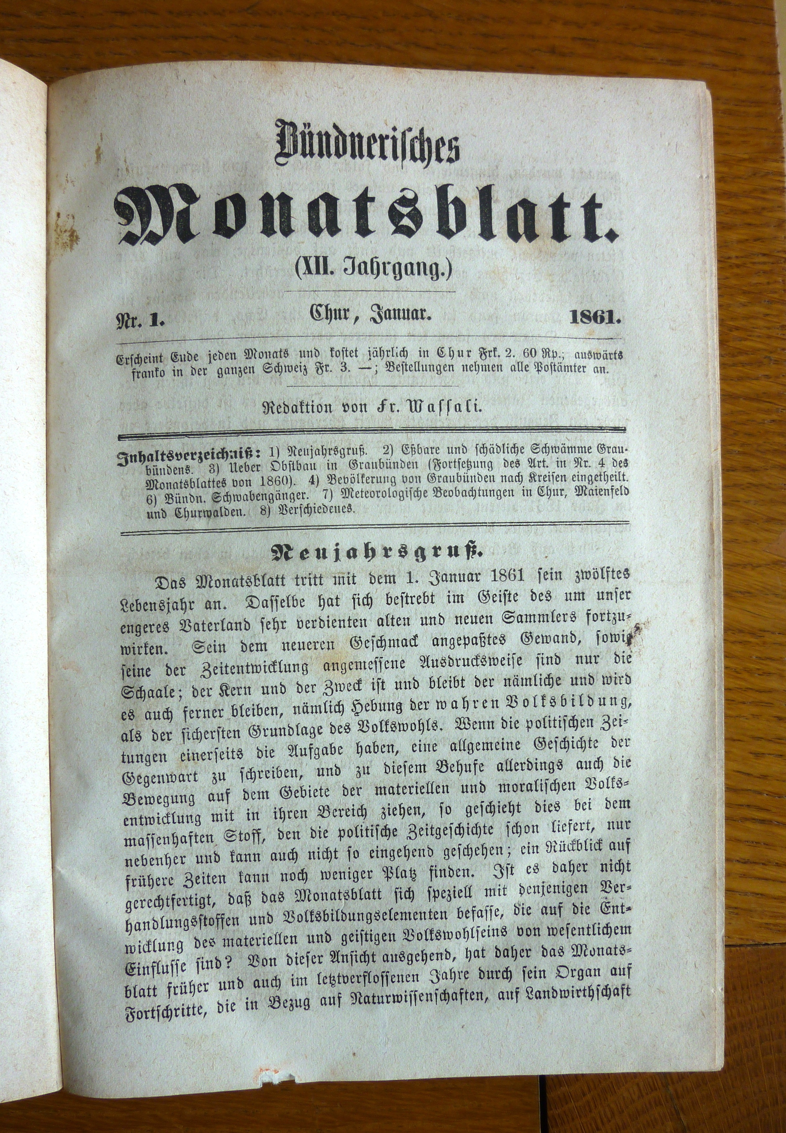 Bündner Monatsblatt1861